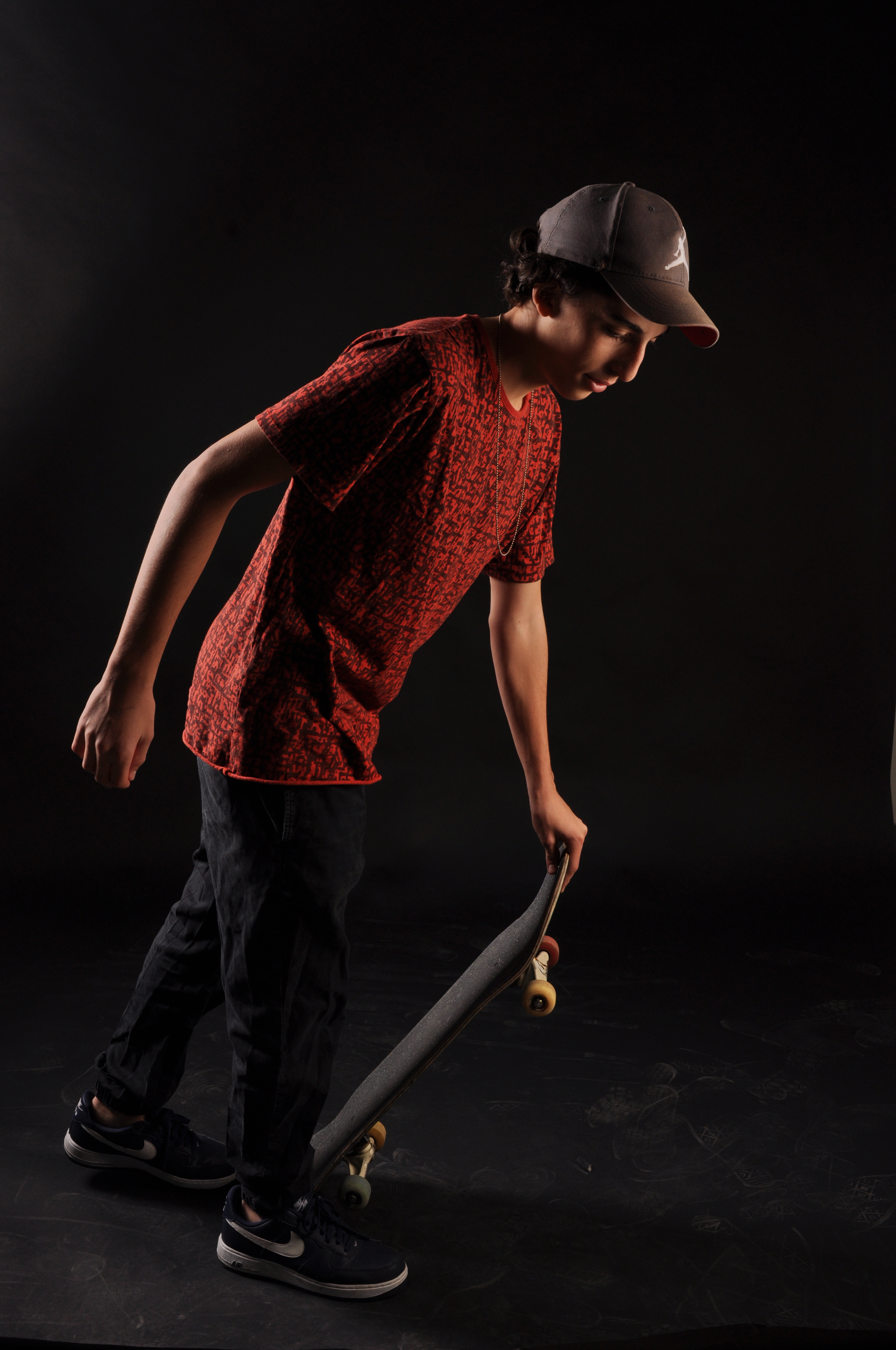 יוגב בן אלקנה סטודיו תיכון רוטברג